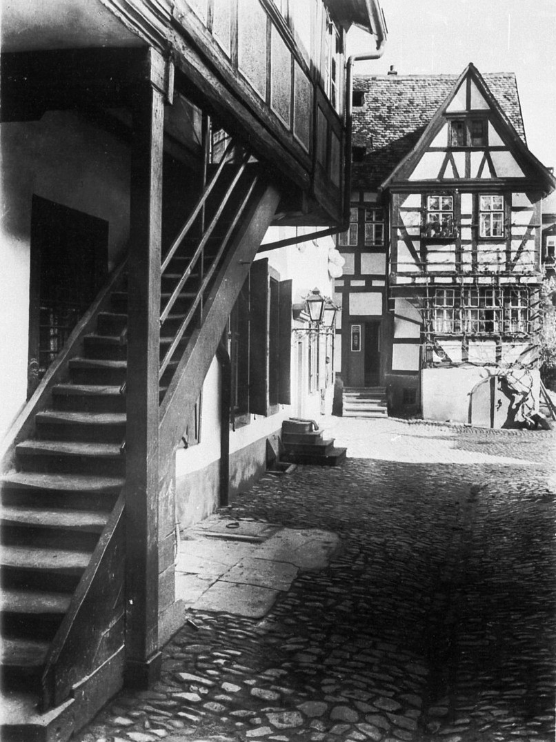 Edelsheimer Hof in der Hanauer Altstadt